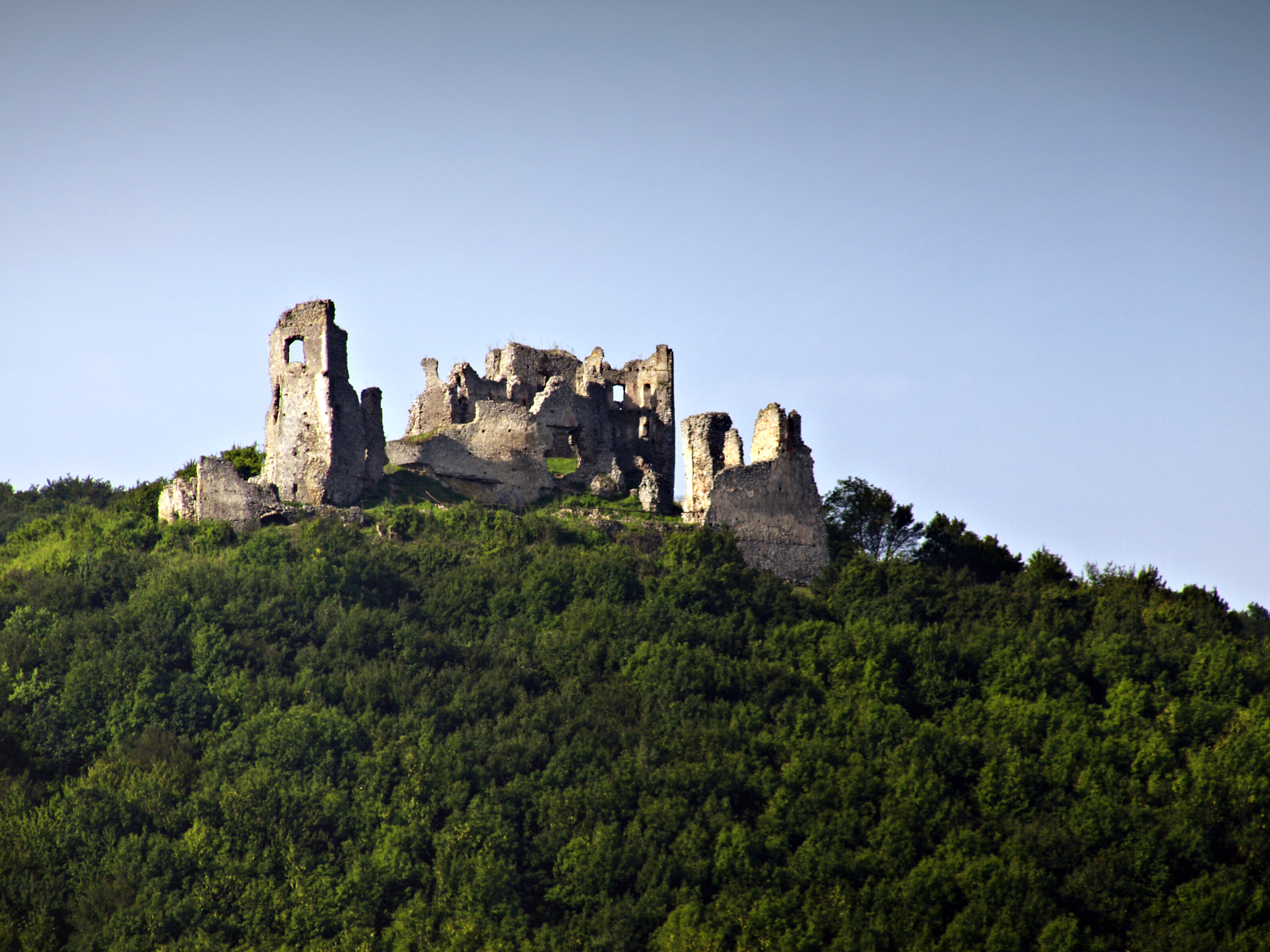 Brekov (Slovaquie) - Ruines du château gothique datant du XIIIe siècle This medium shows the protected monument with the number 702-113/0 in the Slovak Republic.